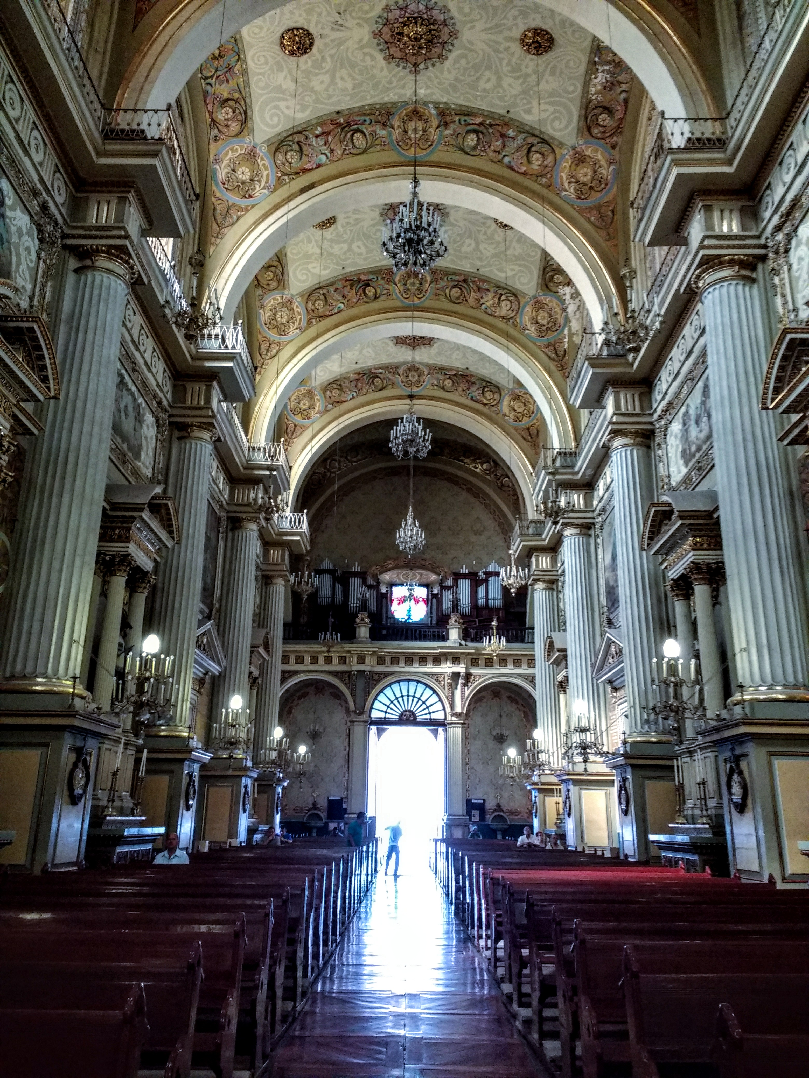 Nave de la Catedral